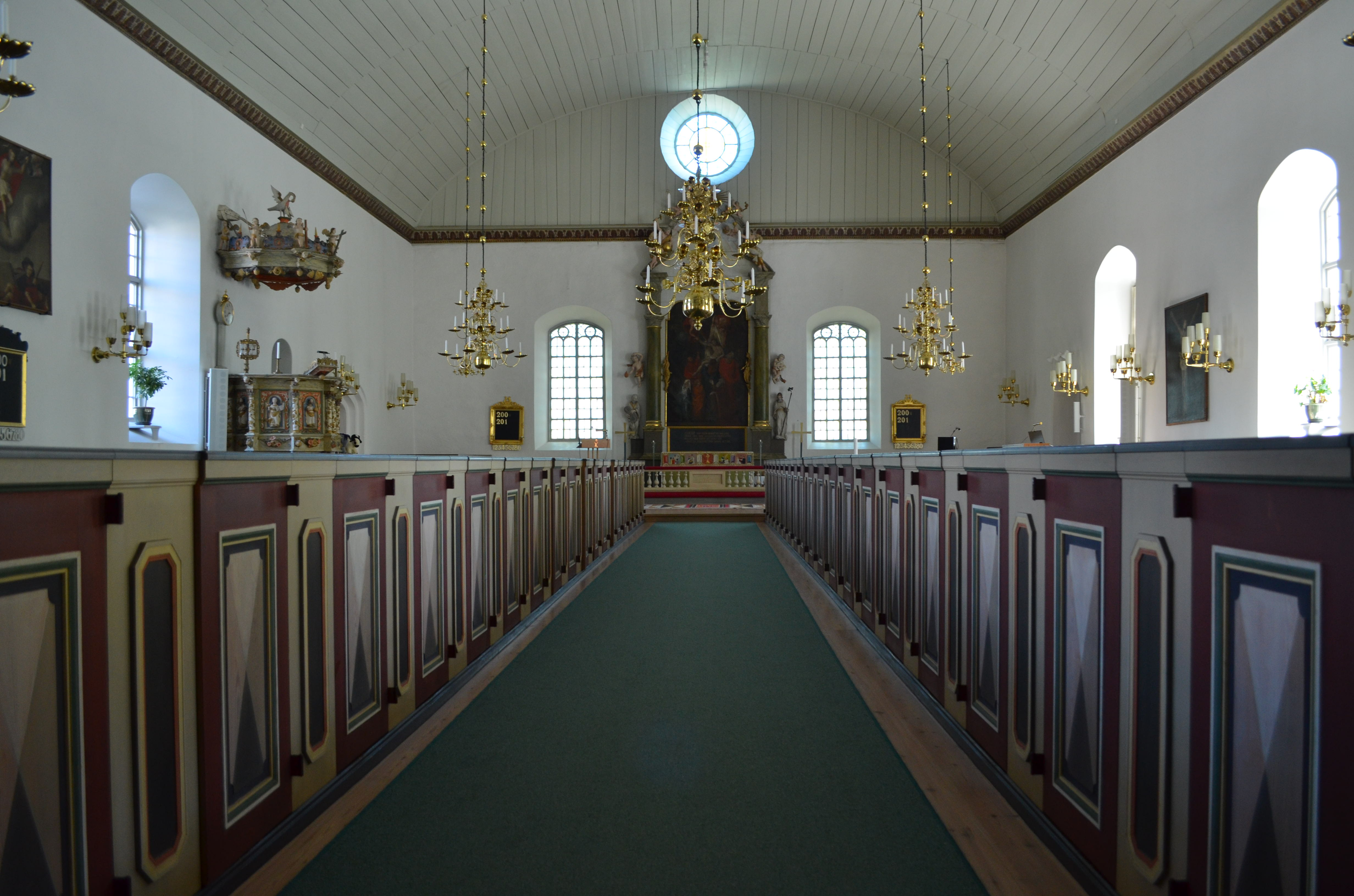 Kyrkosalen